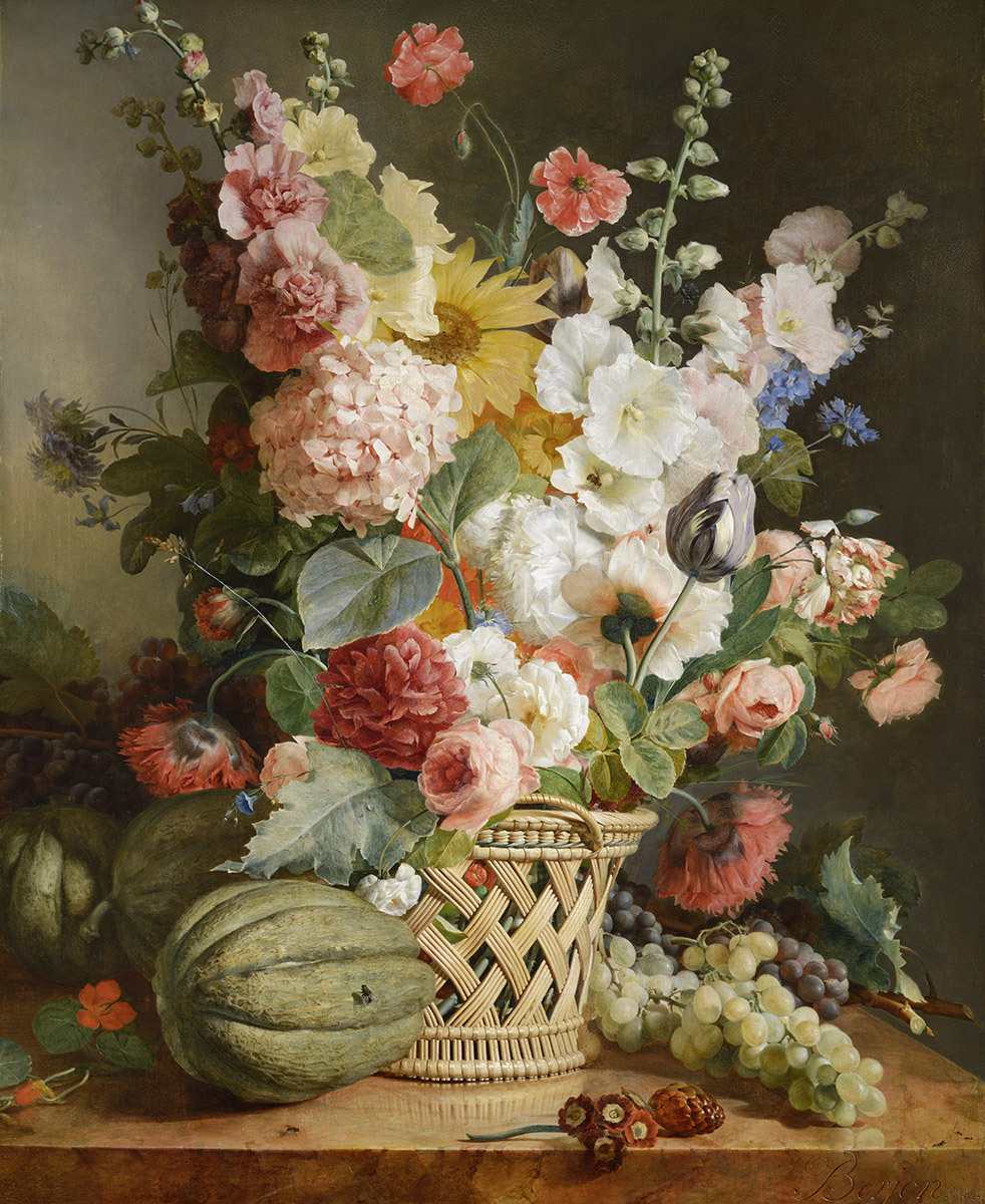 Fruits et fleurs dans une corbeille d'osiertitle QS:P1476,fr:"Fruits et fleurs dans une corbeille d'osier" label QS:Lfr,"Fruits et fleurs dans une corbeille d'osier"